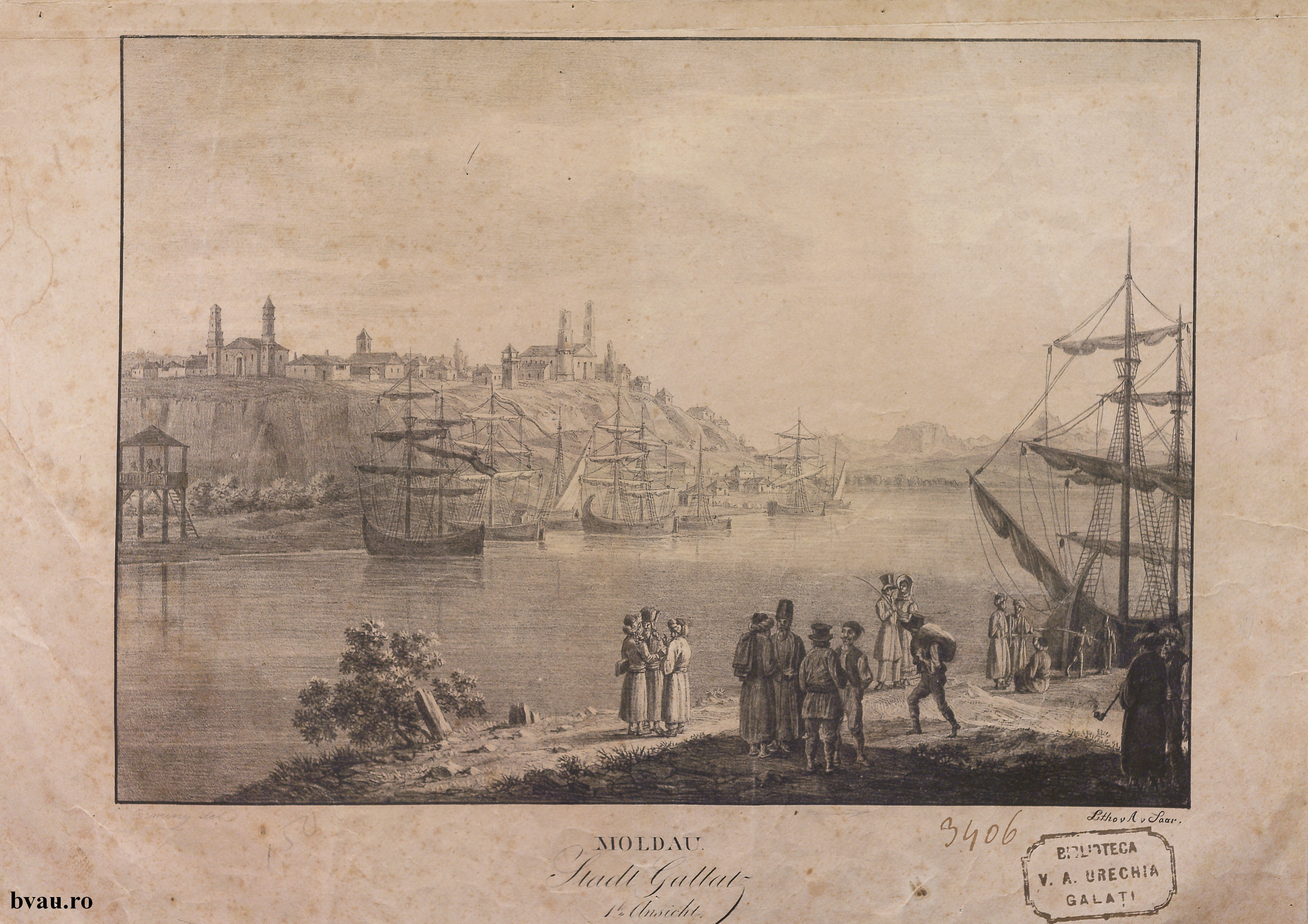 Moldau, Stadt Gallatz